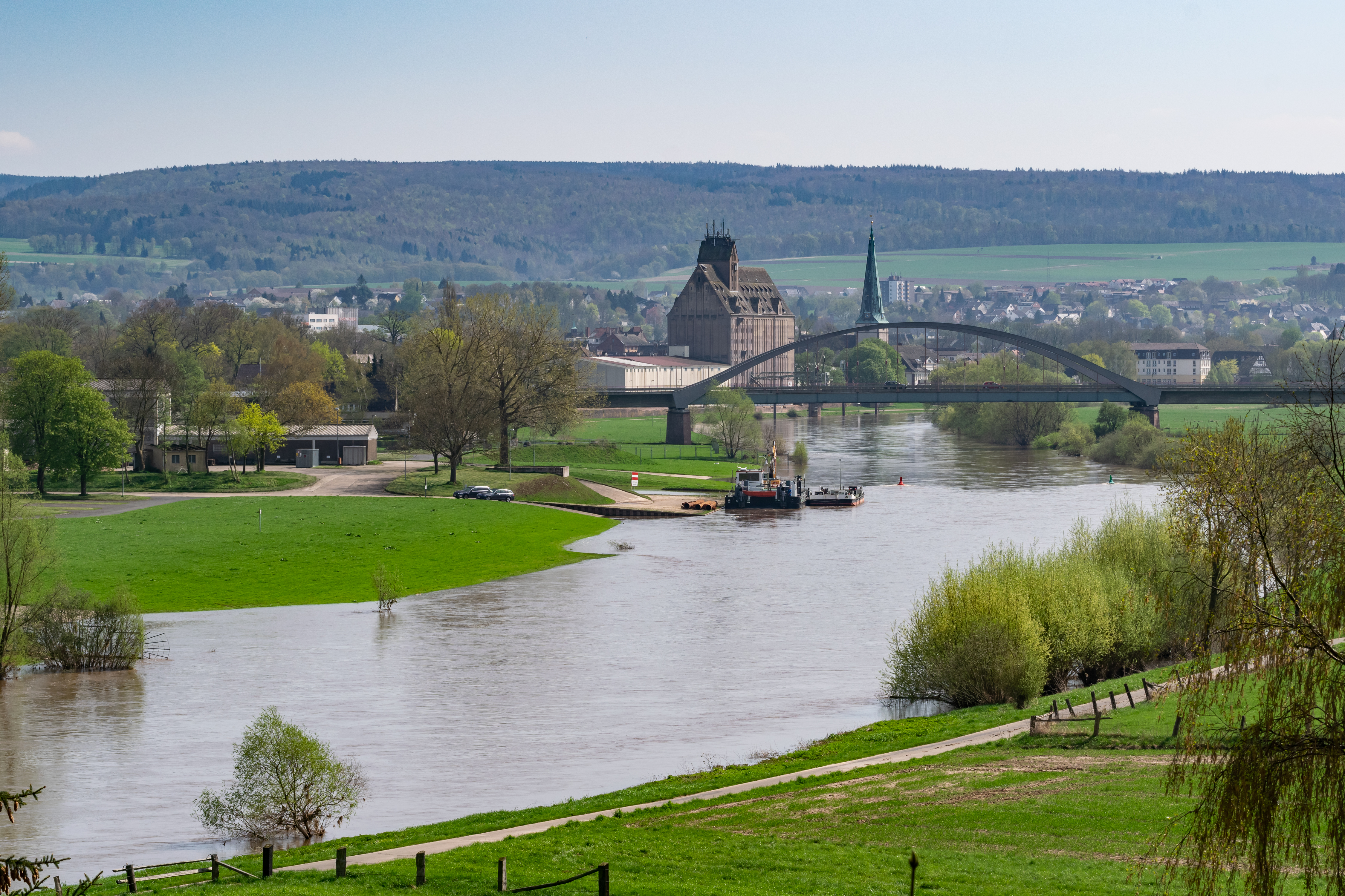 neue Weserbrücke der Bundesstraße 64 zwischen Höxter-Stahle und Holzminden